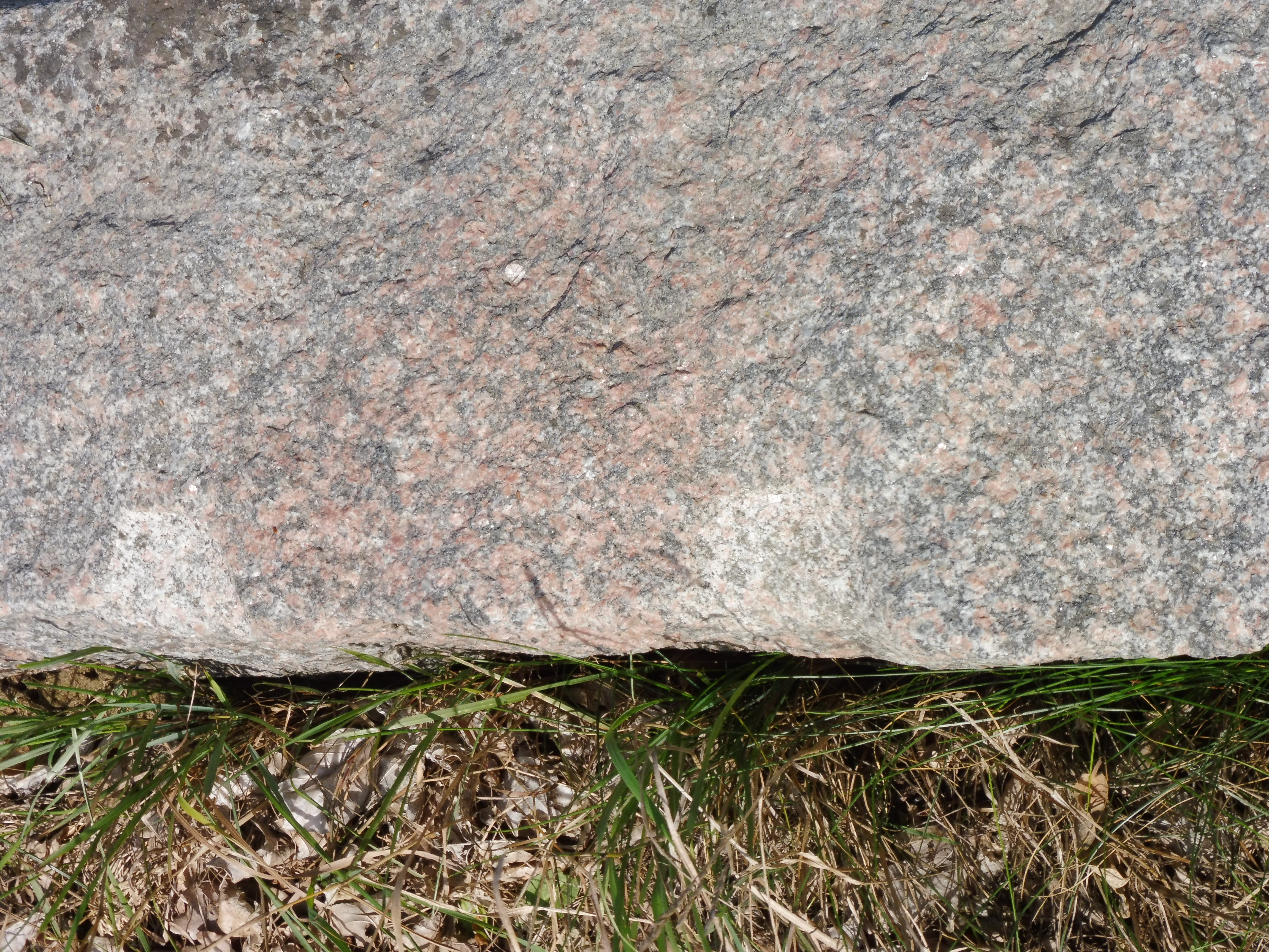 Meißelmarken am gewölbten Unterrand eines Granitsturzes in Leisten, Mecklenburg